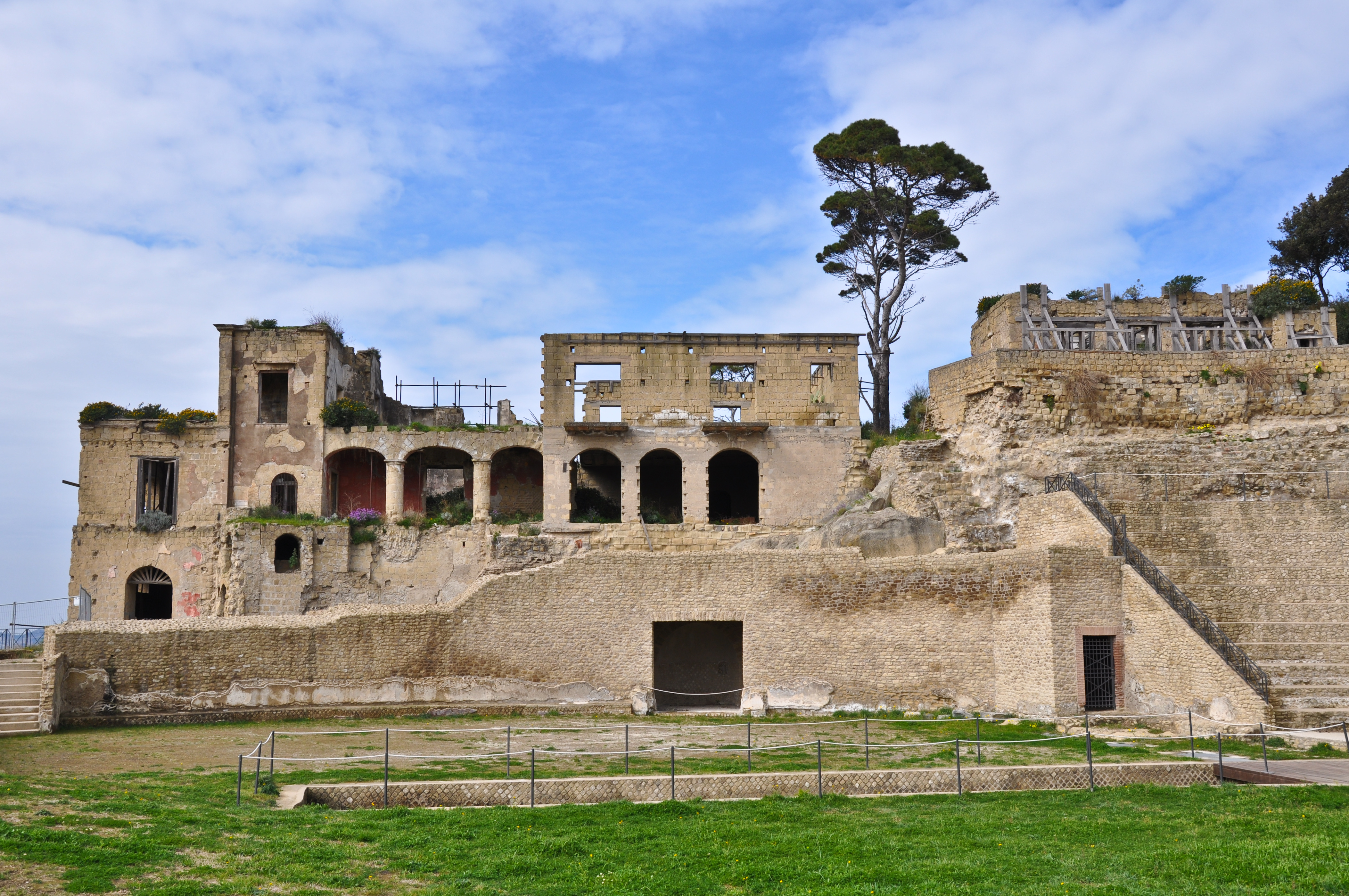 Napoli - Parco archeologico del Pausilypon